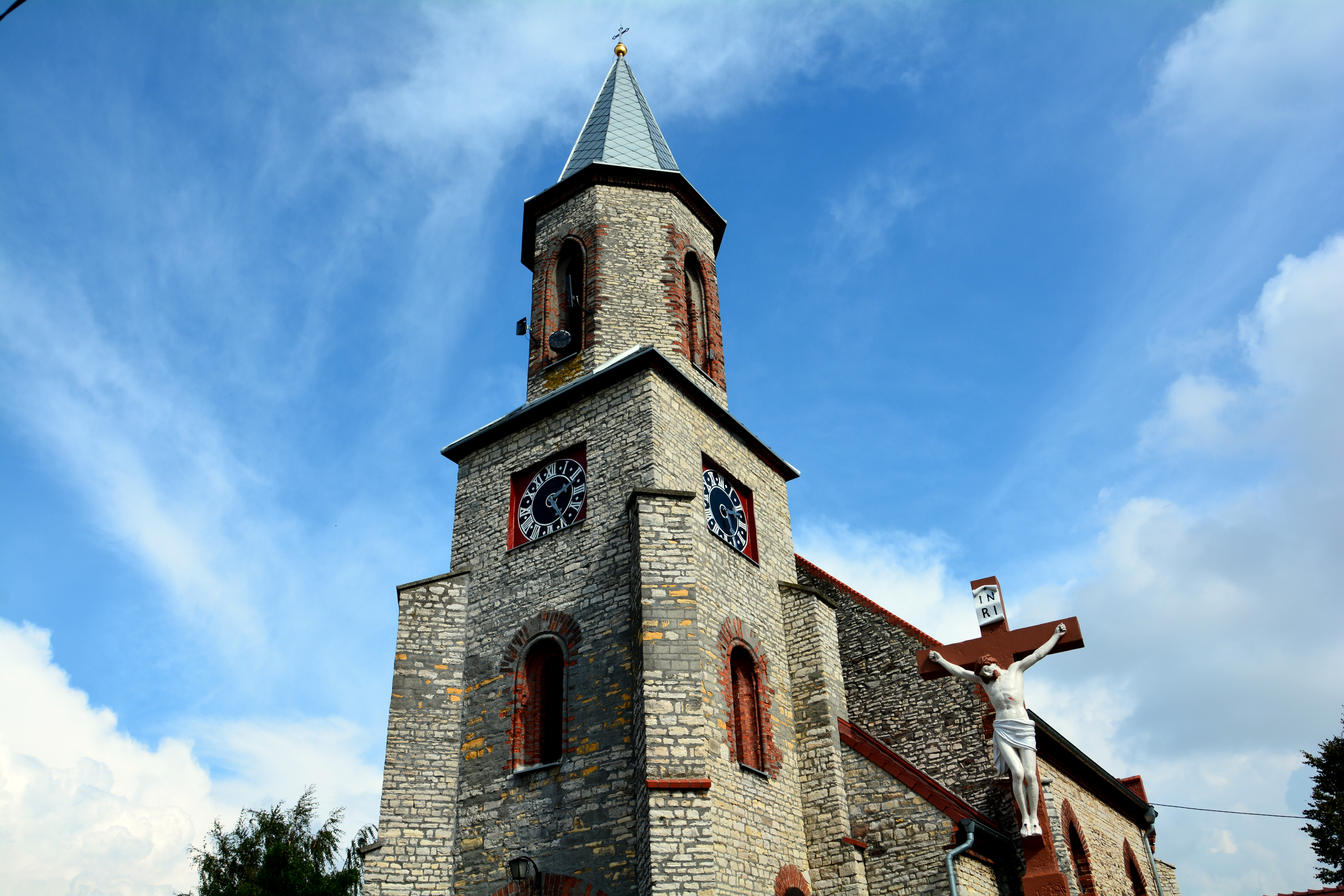 Dolna - kościół parafialny p.w. śś. Piotra i Pawła, XV